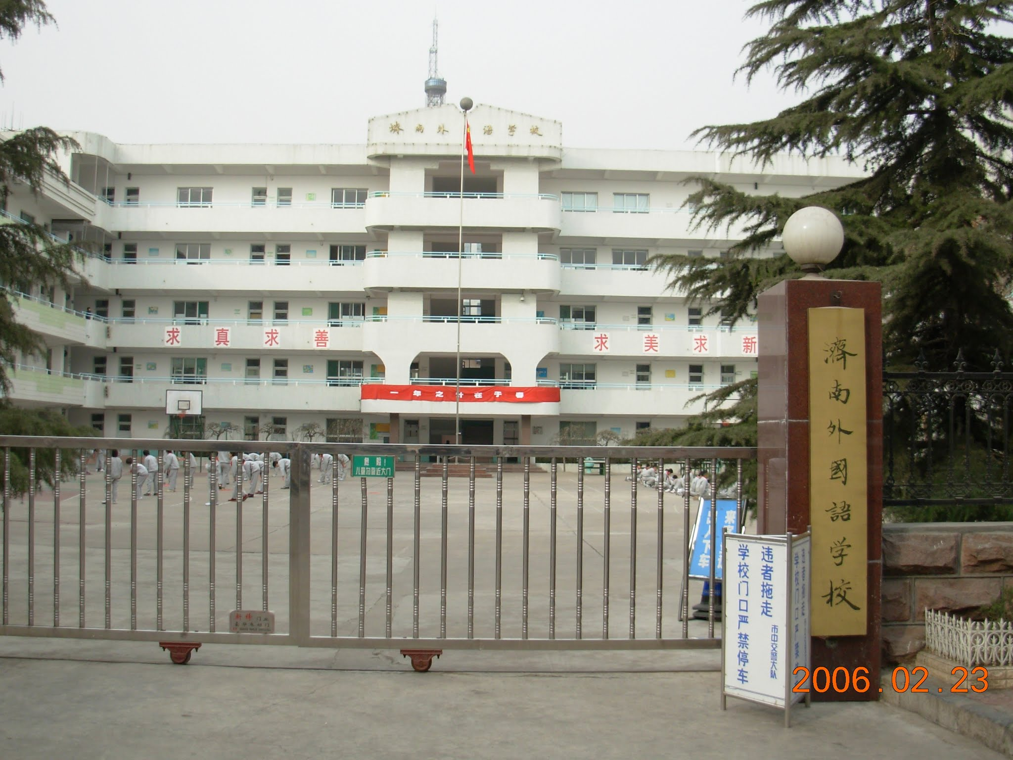 济南外国语学校旧校址，建国小经三路1号